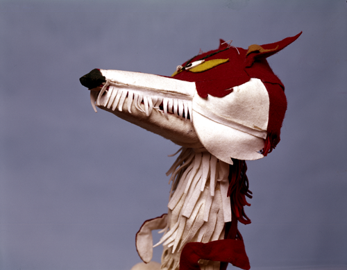 Lowieke de Vos uit de Fabeltjeskrant